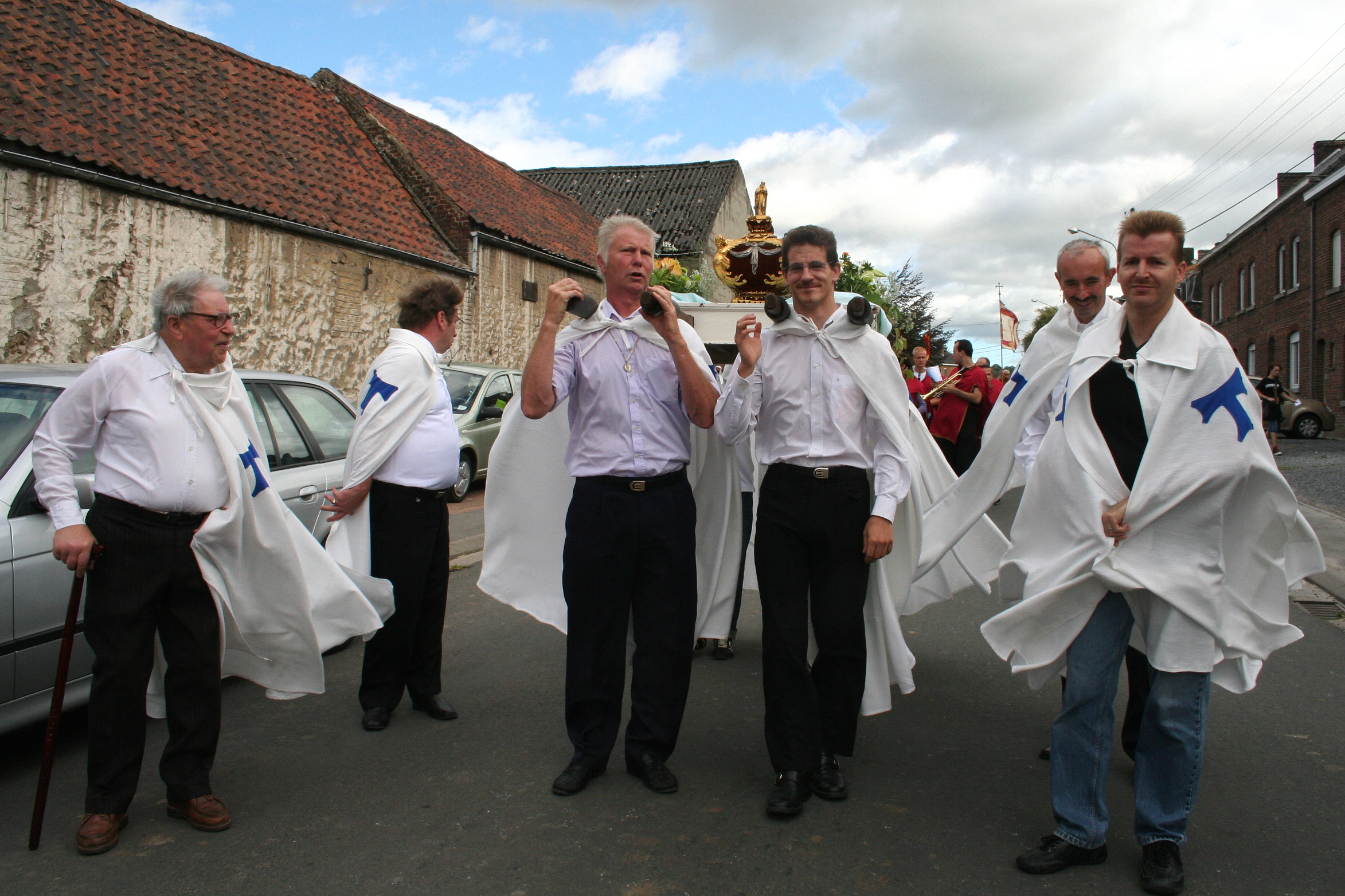 Havré (Belgique), porteurs du reliquaire de Saint-Antoine-en-Barbefosse participant à la processsion dédiée à Notre-Dame de Bon Vouloir lors de la fête de l'Assomption.